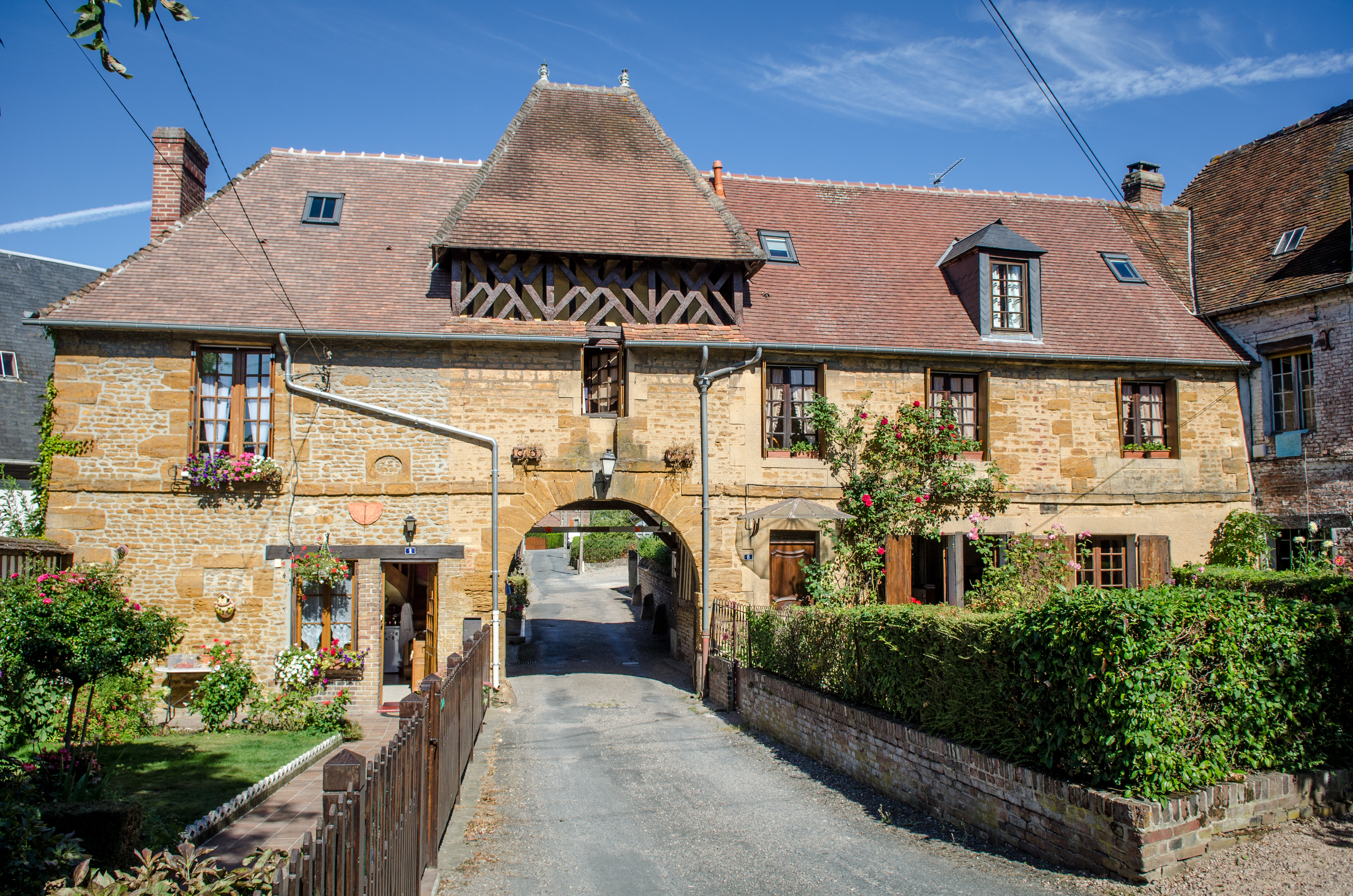 Rue du Perré au coin de la rue du vieux couvent .